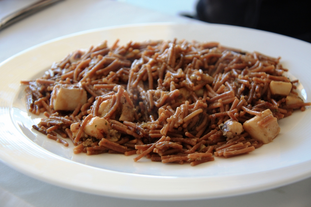 Plato de fideua marinera, en un restaurante de Barcelona.